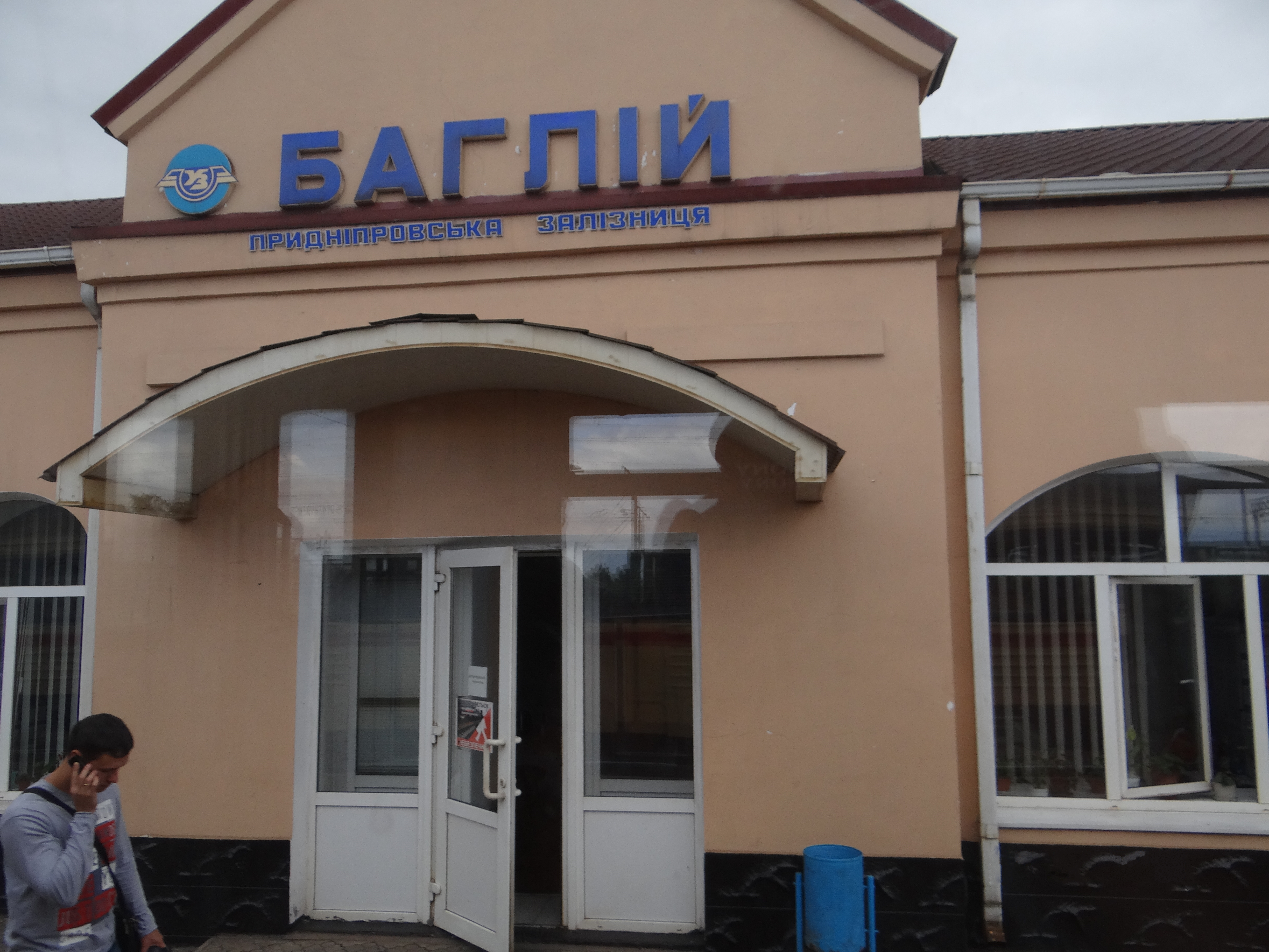 Баглій